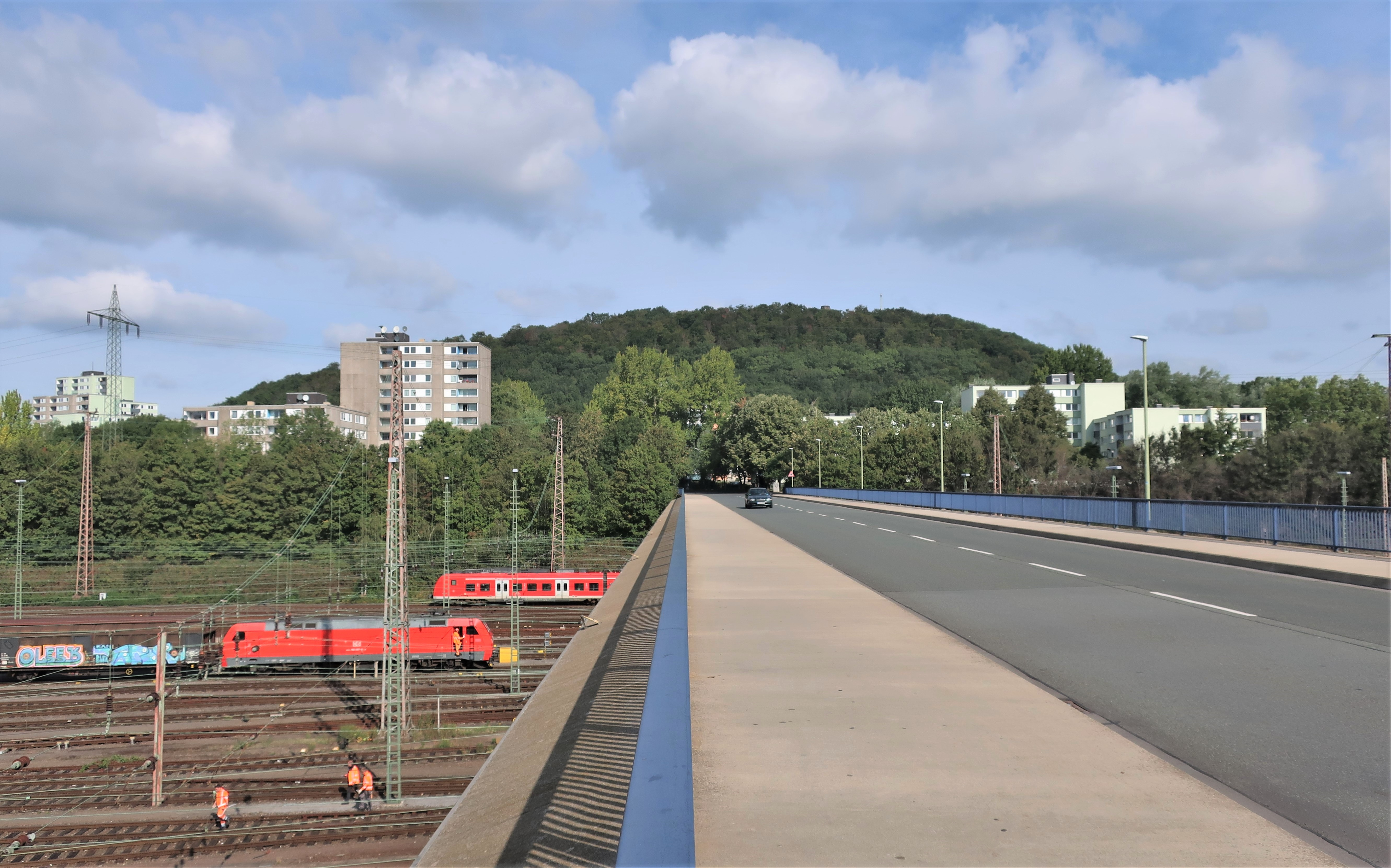 Blick von der Straßenbrücke über den Rangierbahnhof Vorhalle auf den Ortsteil Brockhausen vor dem Kaisberg.